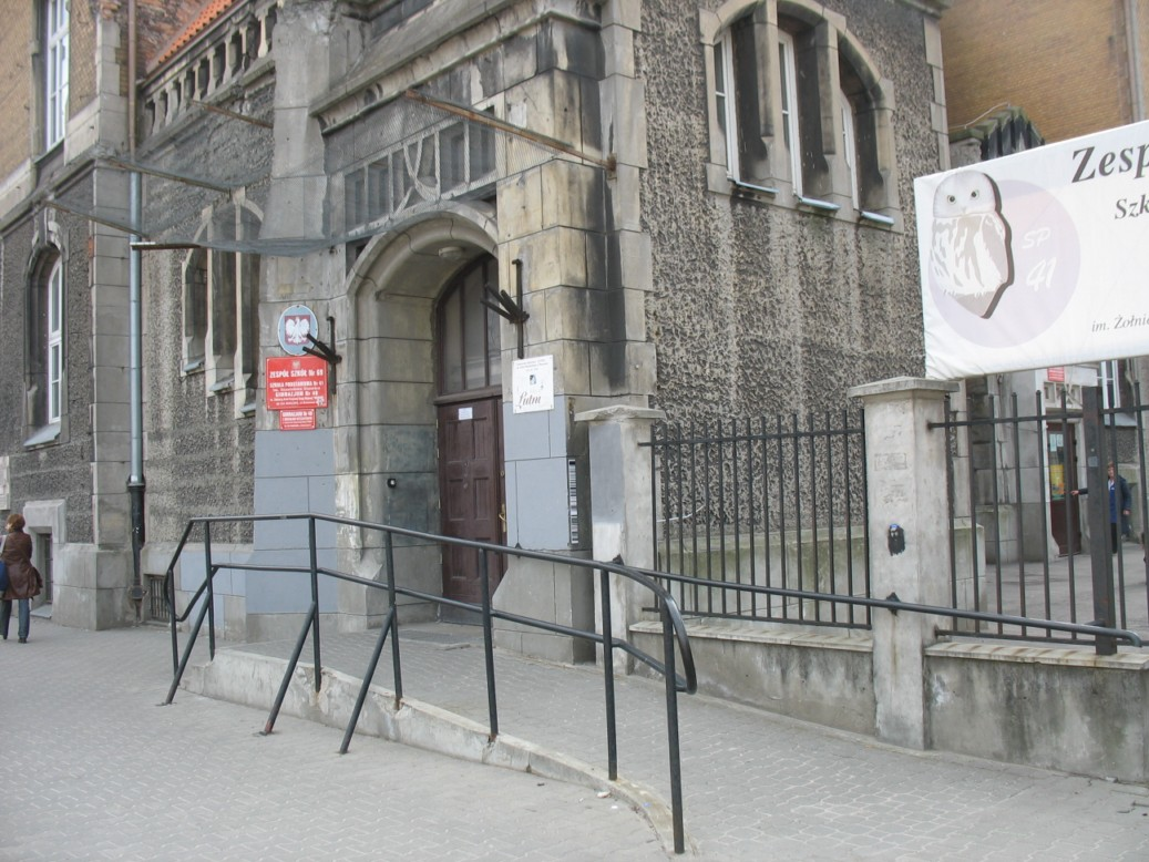 enter 2